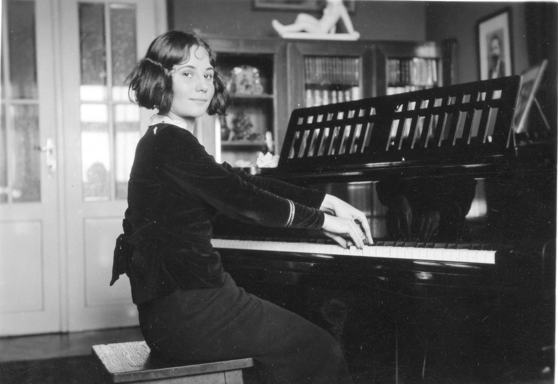 Viktorie Švihlíková na hodině u prof.Kurze